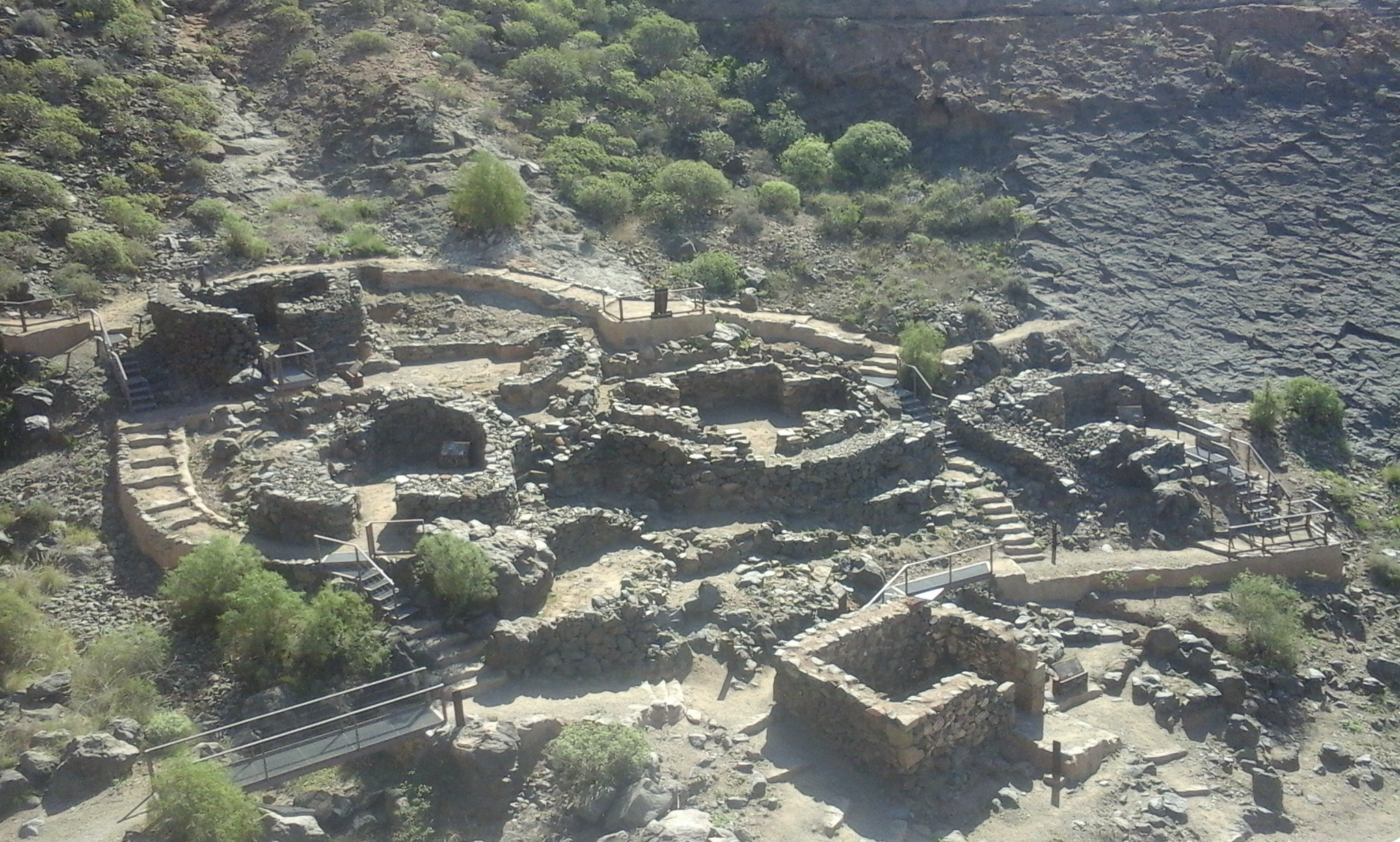 Vistas del poblado central.